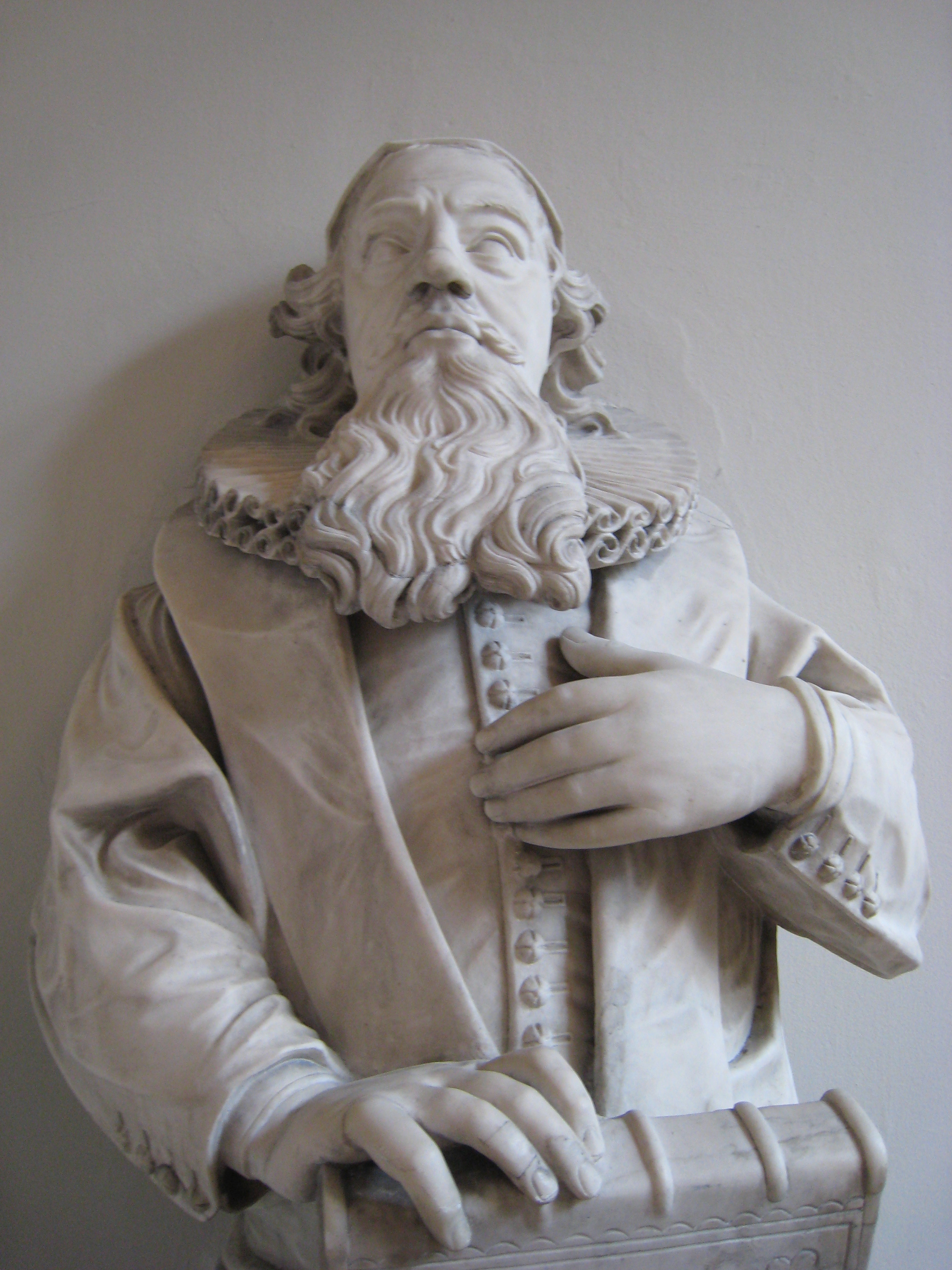 Henrik Bornemann (1/5 1646 - 12/31 1710), bishop of Zealand